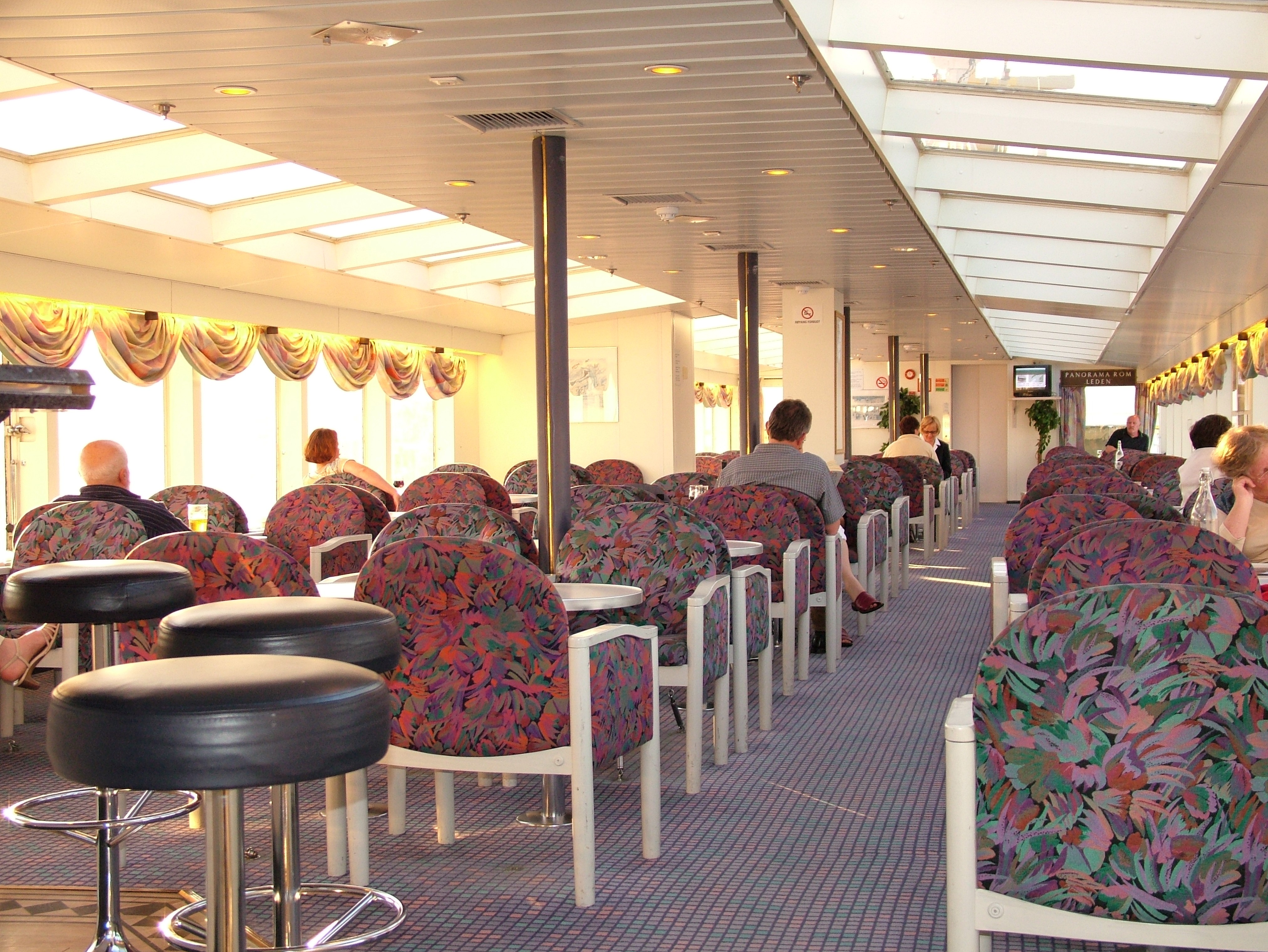 MS Narvik, ein Hurtigrutenschiff, das Panoramadeck